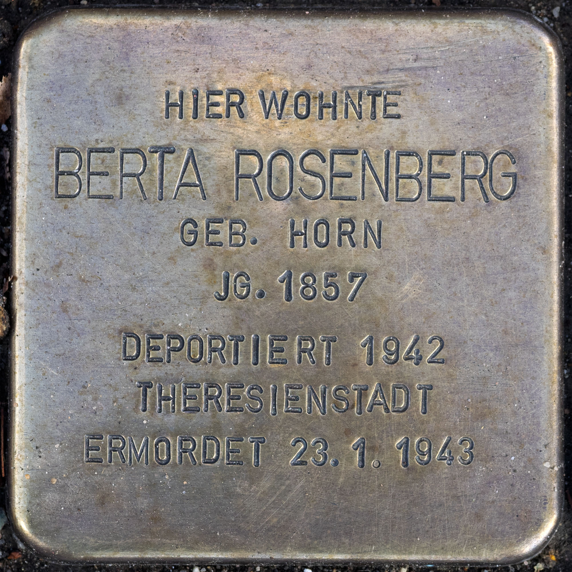 2016 Stolpersteine ToeVo Rosenberg Berta